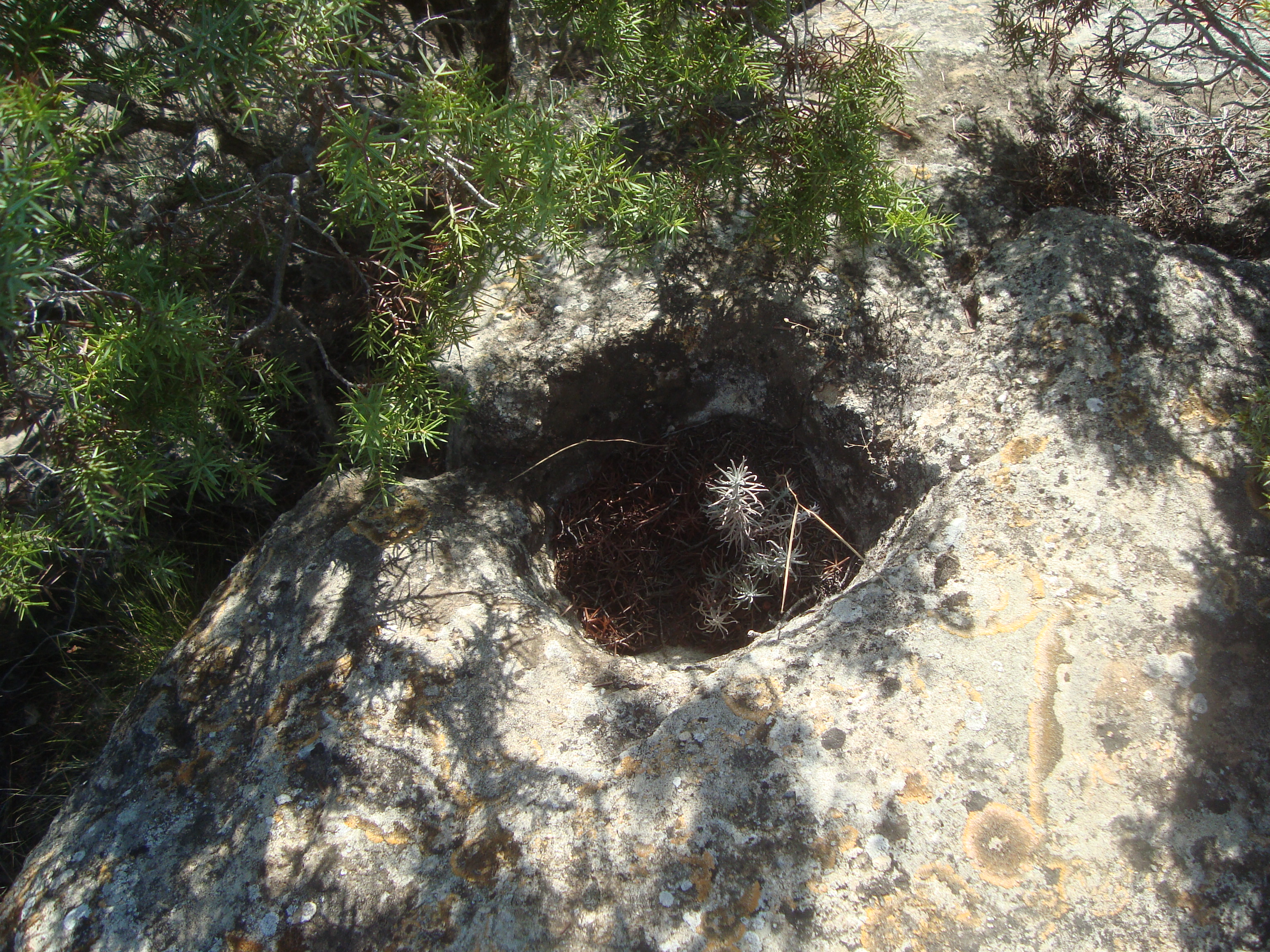 Receptaculo ritual ibérico excavado en la roca, Mas de Toribio (Arenys de Lledó).